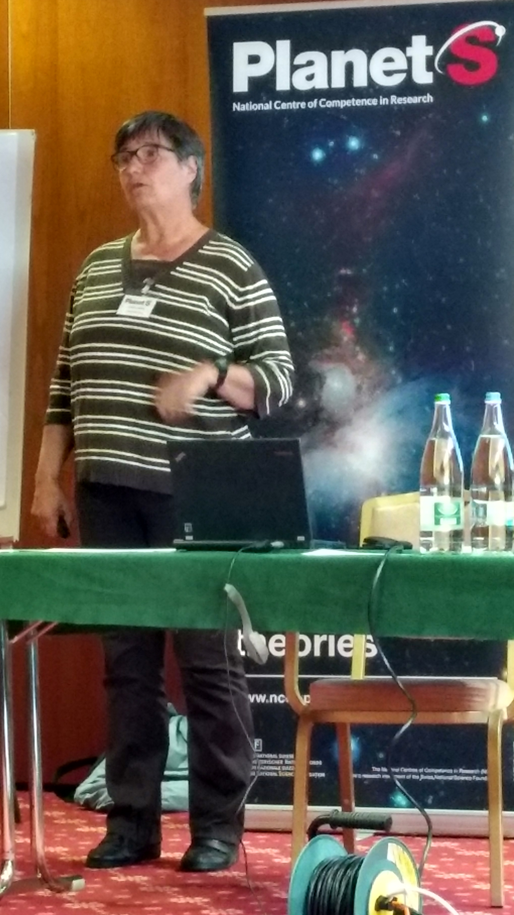 Kathrin Altwegg. PlanetS NCCR meating, 2017. Sainte-Croix